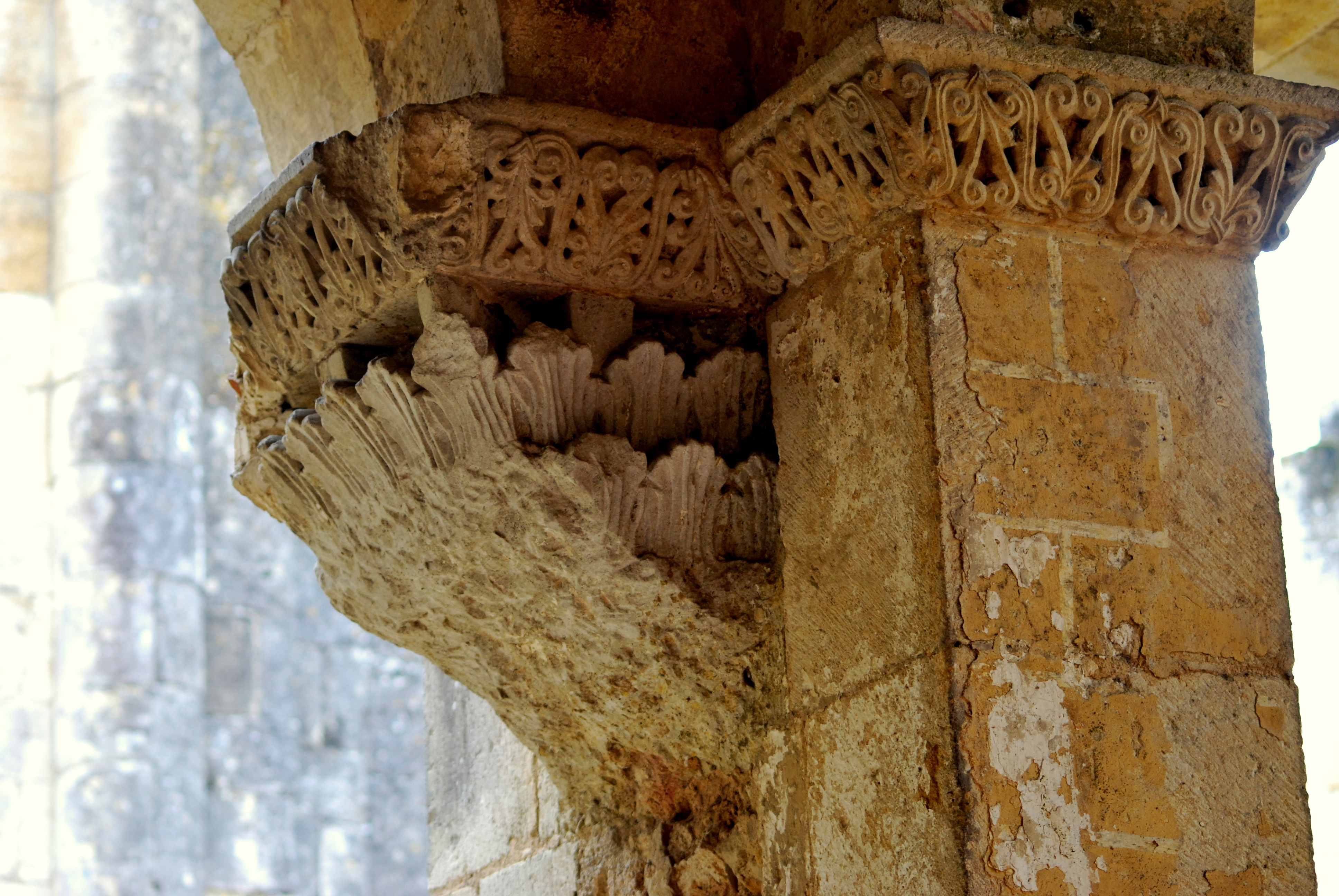 Chapiteau du presbyterium